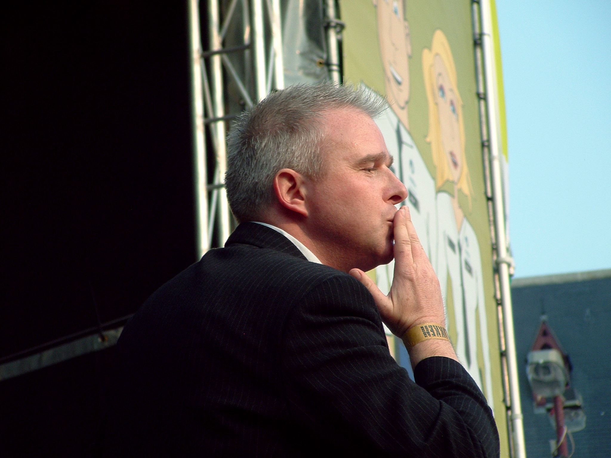 Mark Tijsmans bedankt de aanwezige fans op Flikkendag 2008.